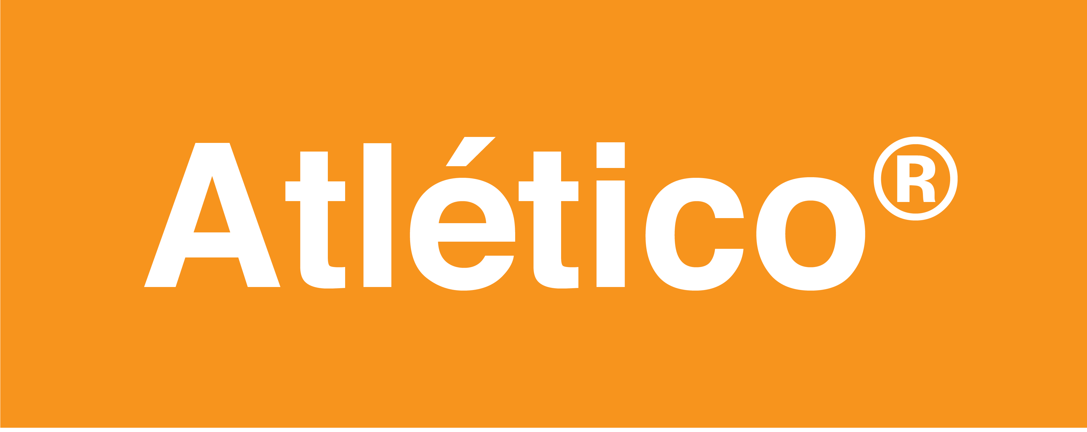 Logo oficial del Colectivo Atlético